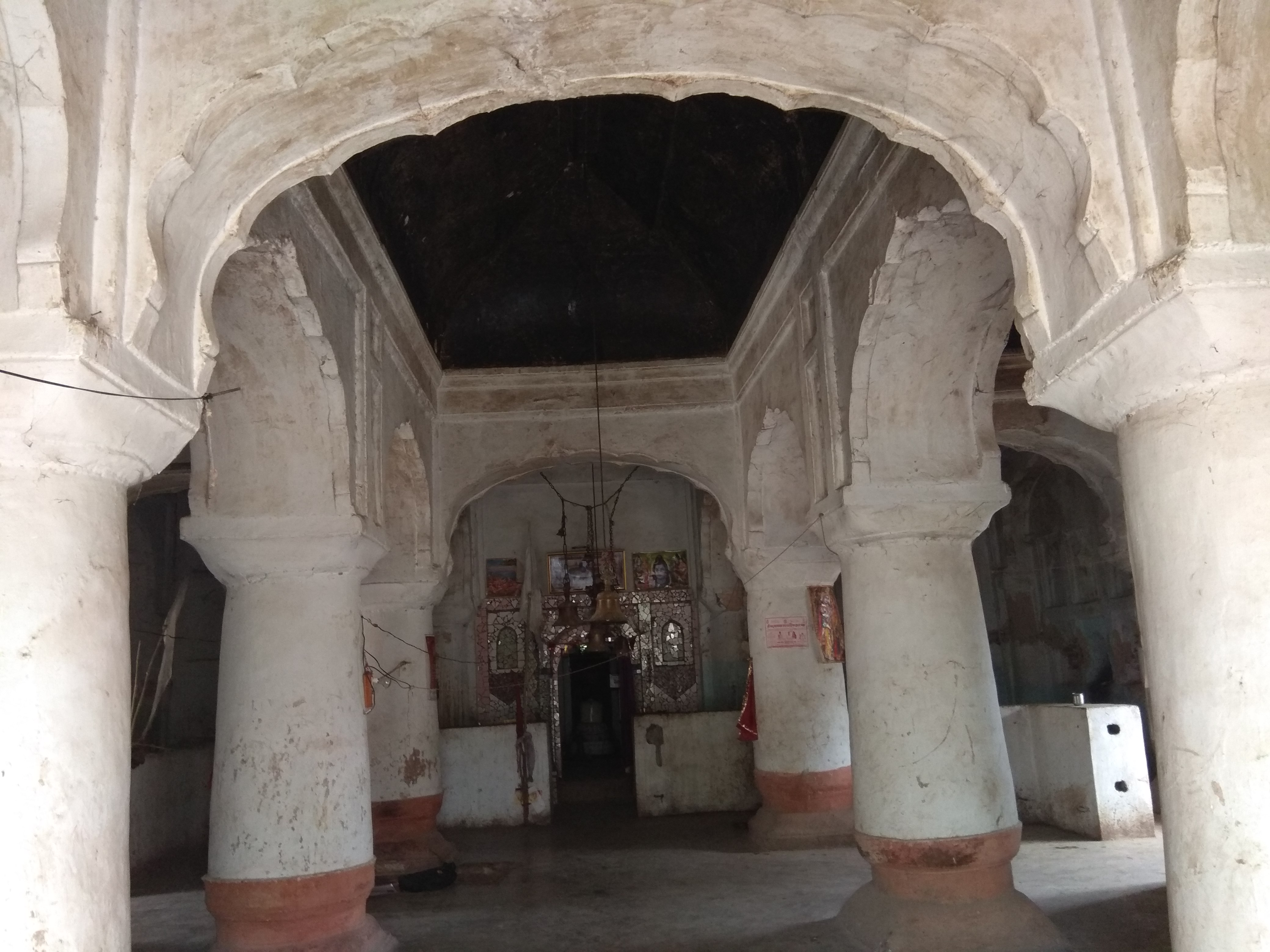 मन्दिर का बरामदा